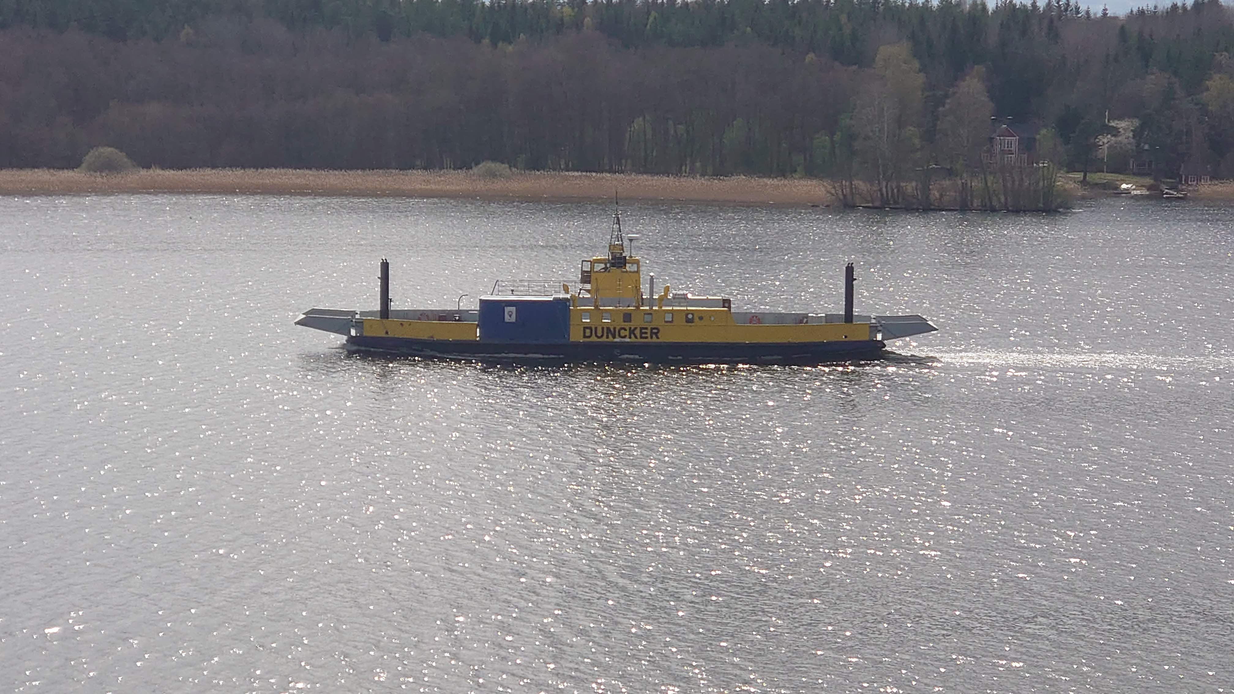 M/S Duncker är en svensk vägfärja byggd på Åsi-Verkens varv i Åmål år 1961.